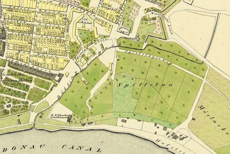 Unterlauf des Döblinger Baches um etwa 1830